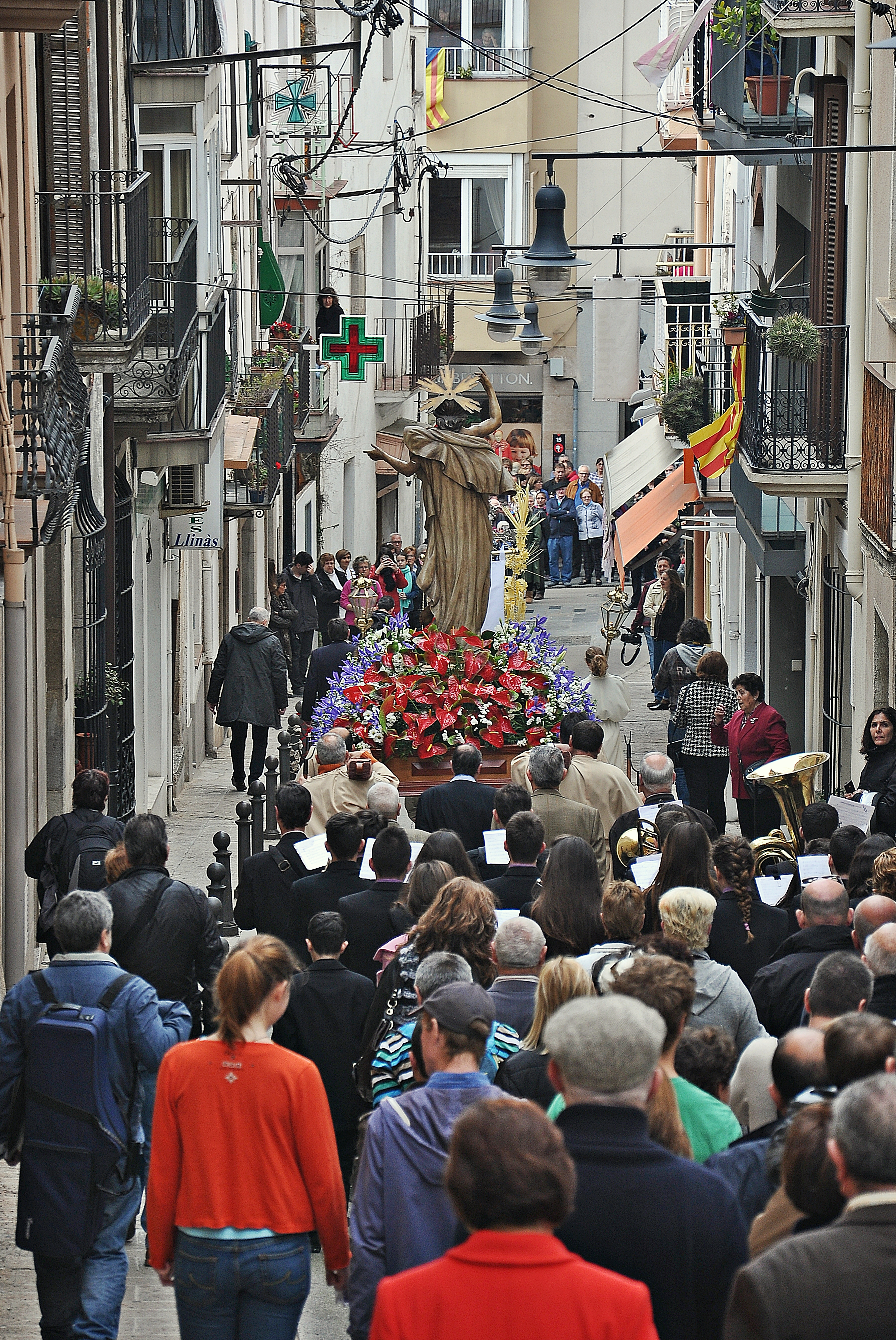 Blanes: Procesión de la imagen del cristo resucitado.